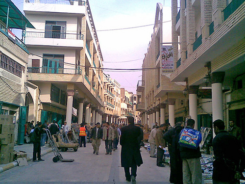 Mutanabi, Baghdad